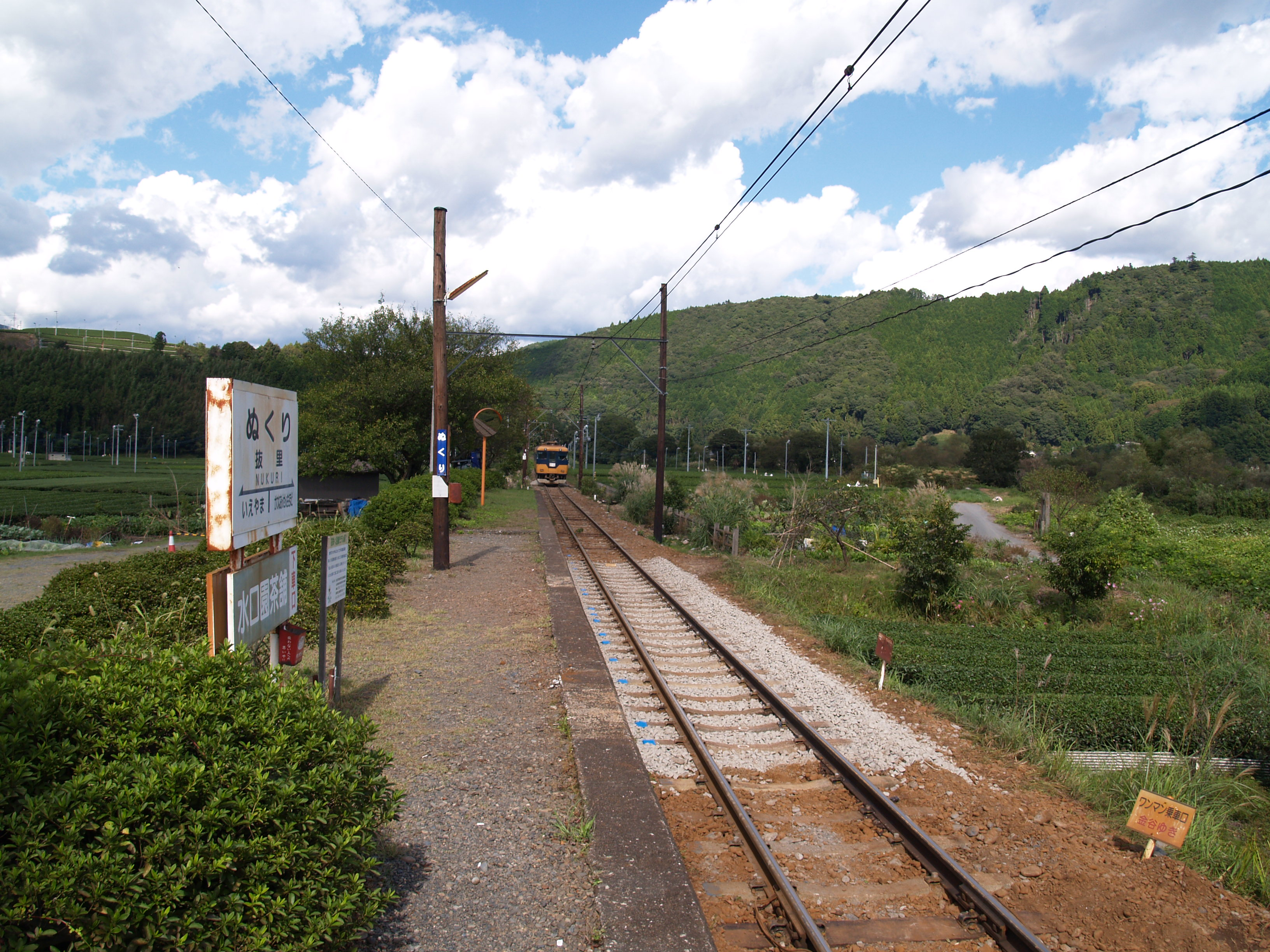 抜里駅ホーム